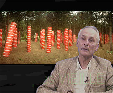 Portrait de Jacques Vieille